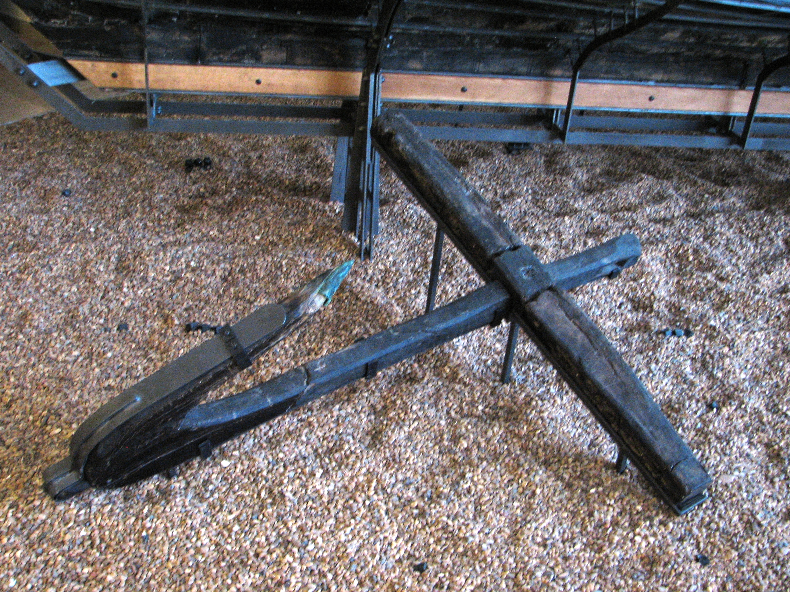 The Ma'agan Michael Ship is a 5th-century BC merchantman discovered off the coast of Ma'agan Michael, Israel, in 1985. הספינה העתיקה ממעגן מיכאל, היא ספינת סוחר פניקית מעץ מסוף המאה החמישית לפנה"ס שהתגלתה ב-1985 בים במרחק 70 מטר מחוף קיבוץ מעגן מיכאל בעומק של שני מטר עוגן הספינה